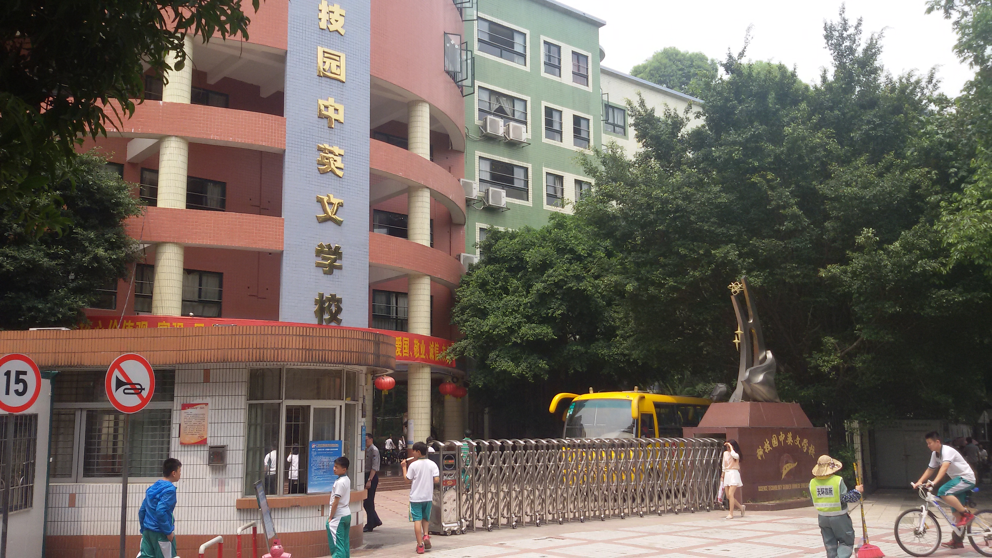 粵語: 科技園中英文學校